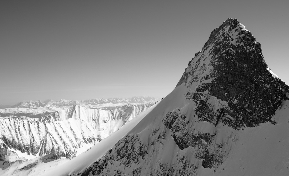 Lemminge am Gabler